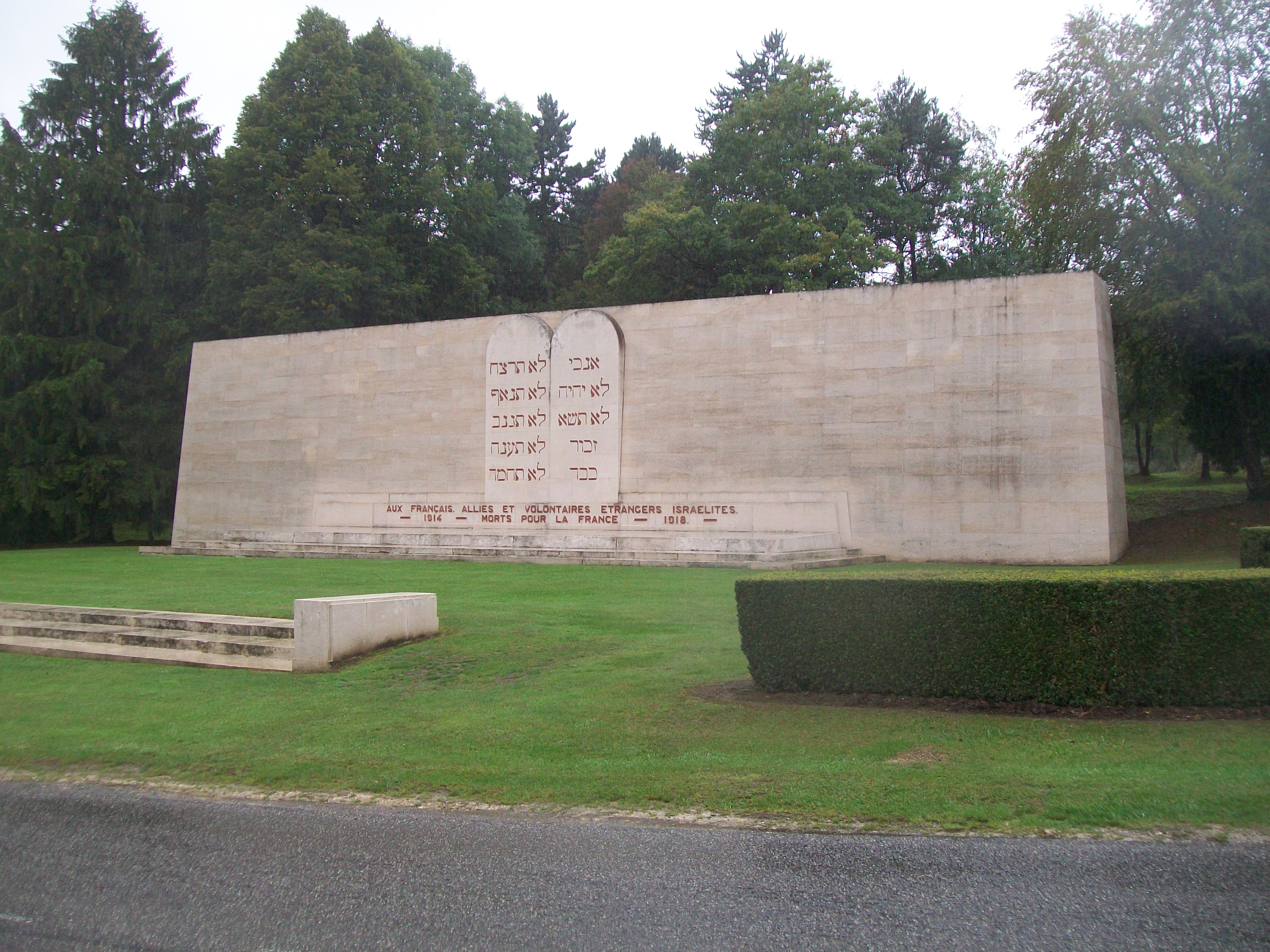 Inauguré le 19 juin 1938